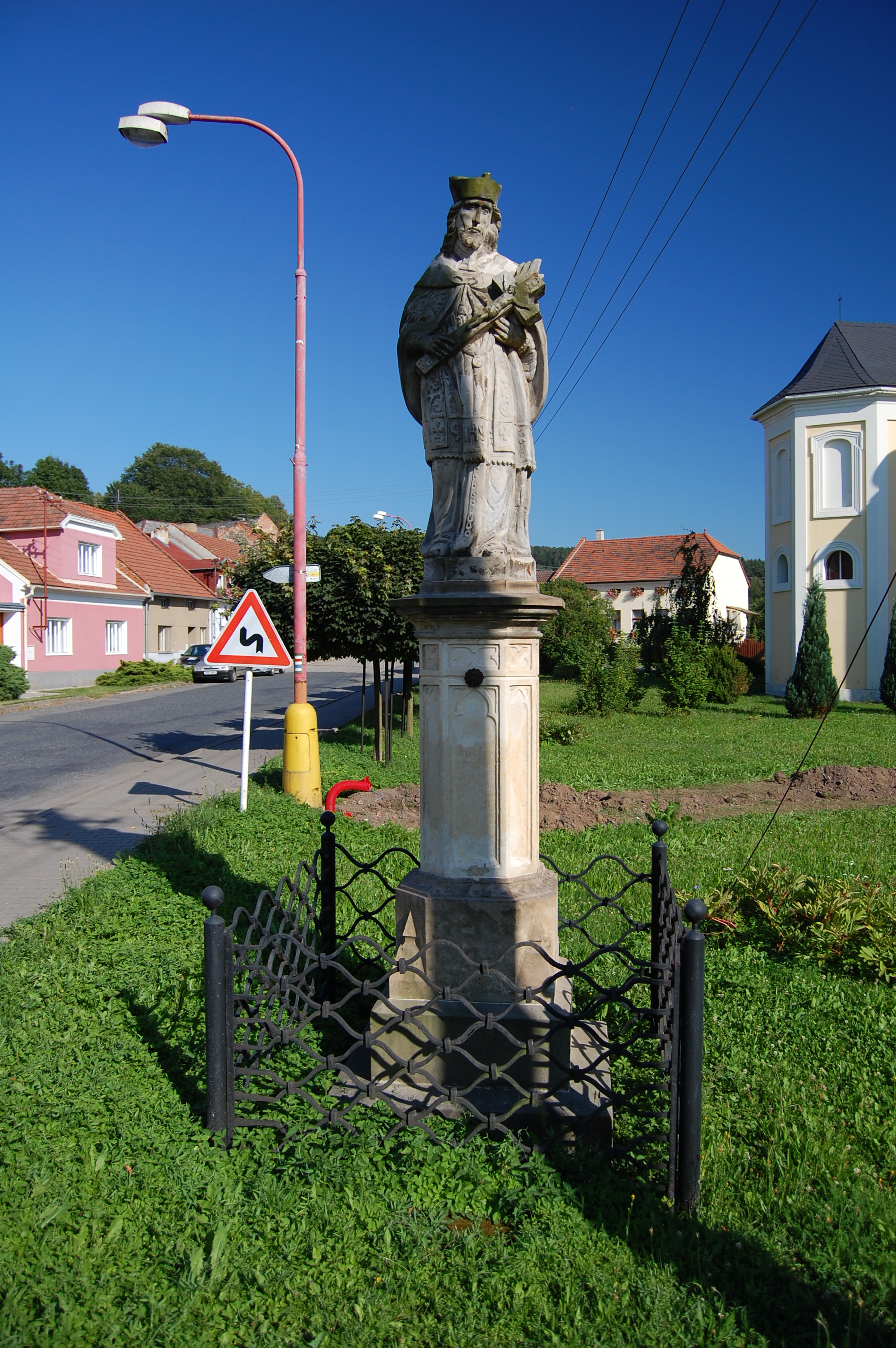 Socha na návsi, Jaroměřice, okres Svitavy